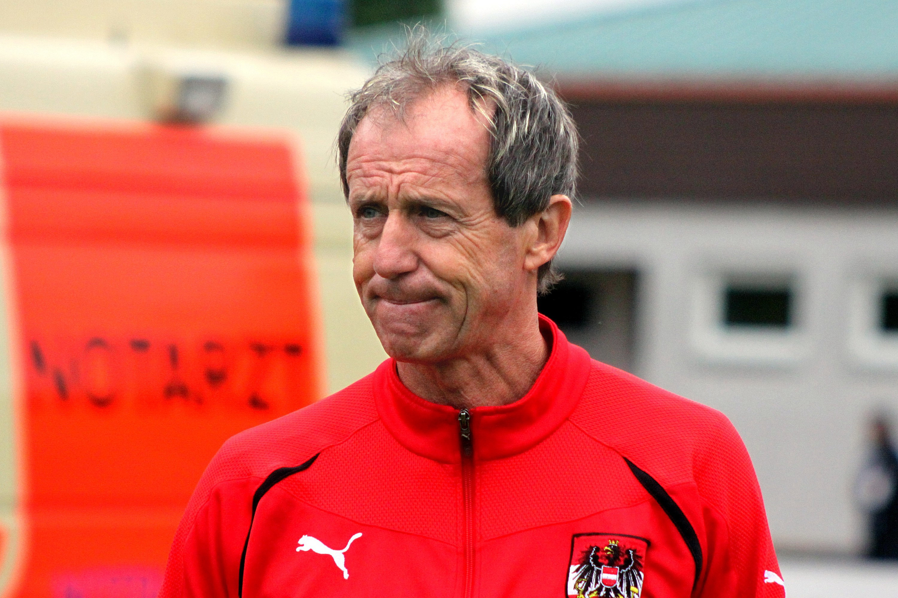 Qualifikationsspiel zur U-19 Fußball-Europameisterschaft: Österreich] gegen Frankreich am 10. Juni 2013 (0:1)] in Traiskirchen.] - Das Foto zeigt den österreichischen Tormanntrainer Klaus Lindenberger. en Qualification for the 2013 UEFA European Under-19 Football Championship qualification Austria vs. France (0:1) on 2013-2013-06-10 in Traiskirchen. – The photo shows goalkeeper-coach Klaus Lindenberger (Autria).